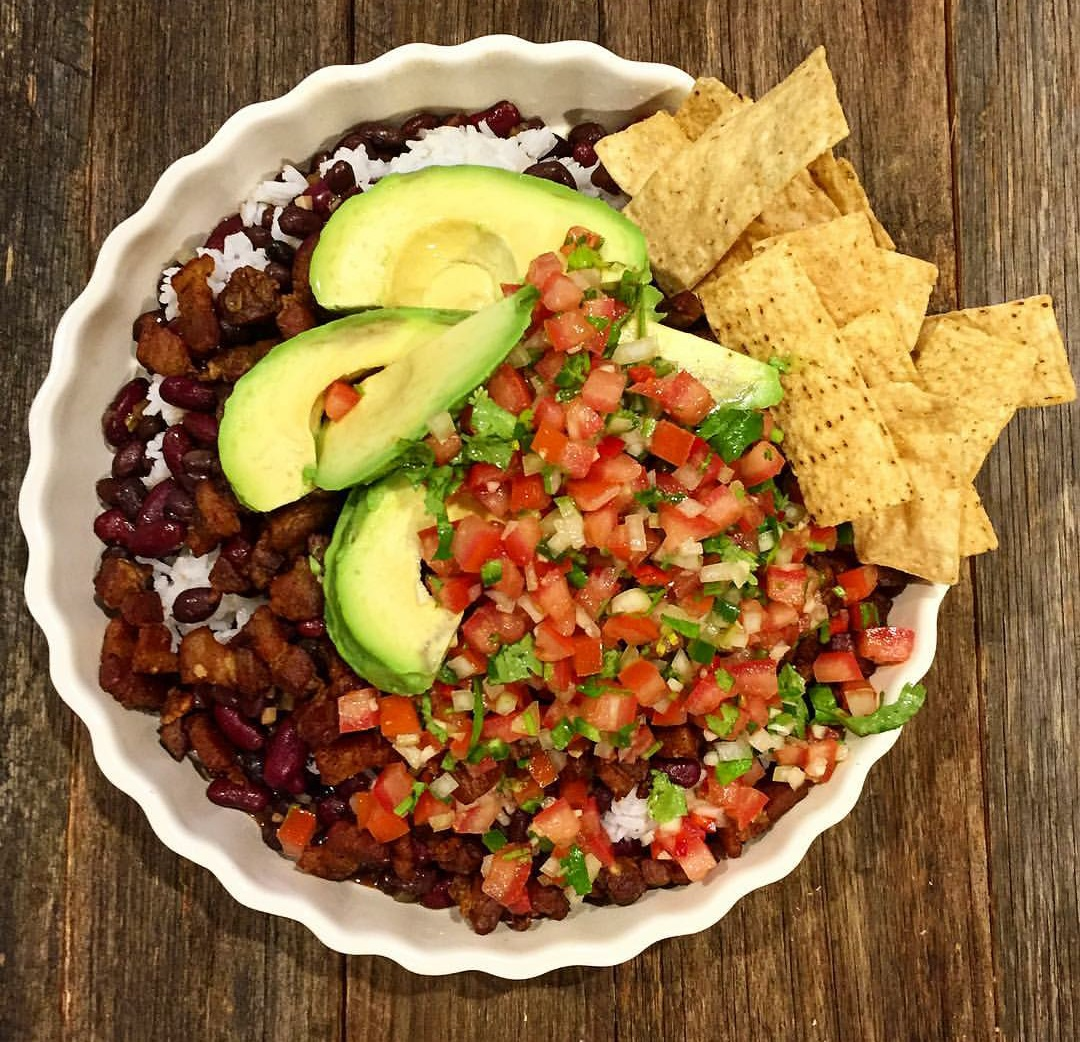 Chifrijo tico con aguacate y tortillitas, tazón grande Turismo AyB